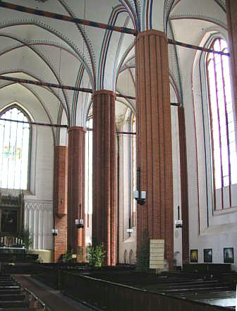 Marienkirche Greifswald, Innenansicht